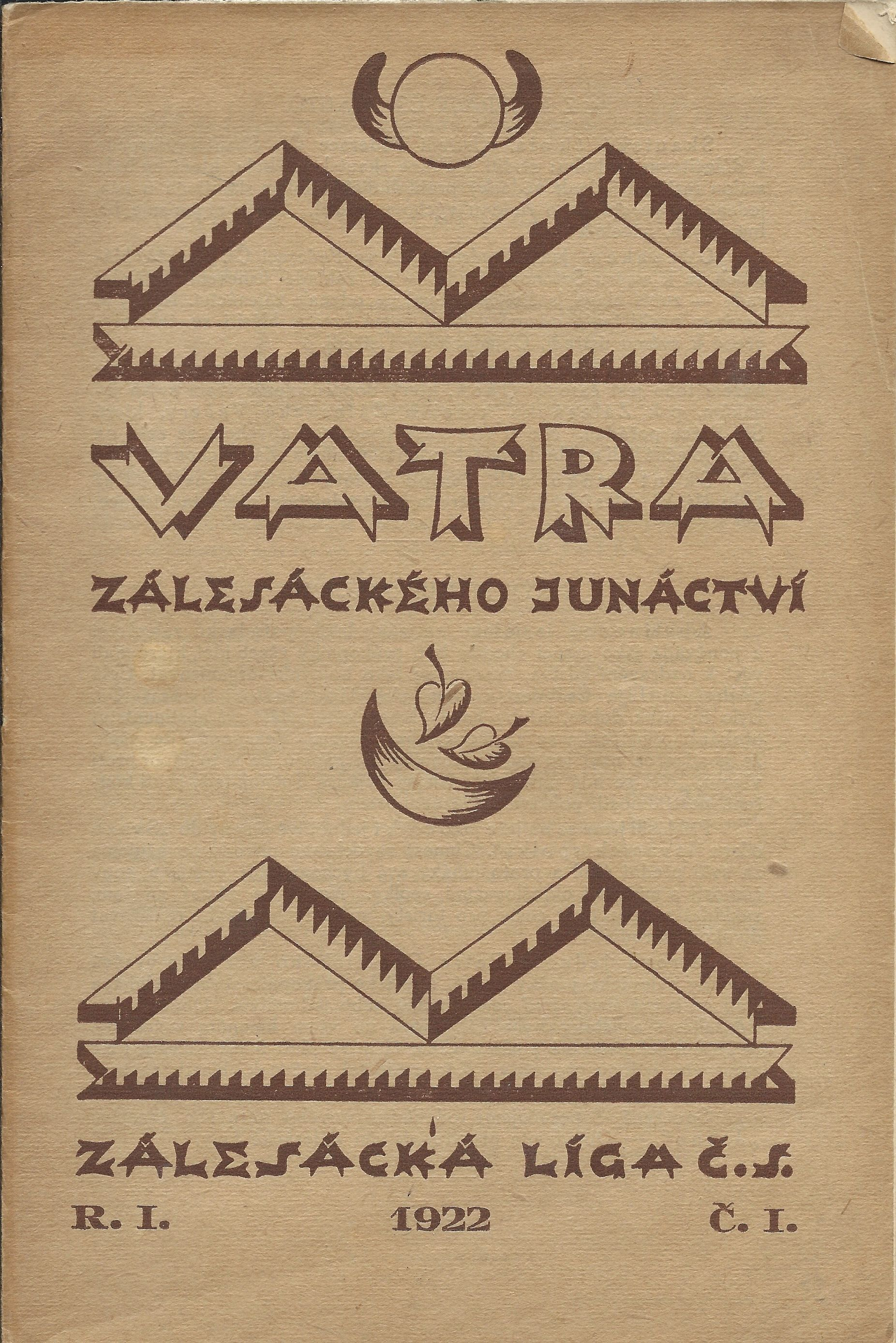 Časopis Vatra 1/1922 - obálka.